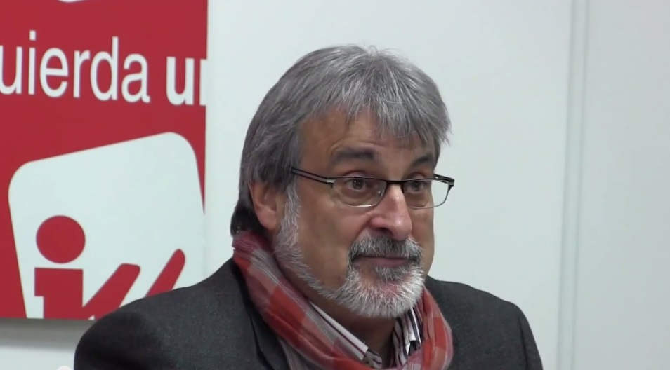 José María González Suárez, Coordinador General de Izquierda Unida en Castilla y León.